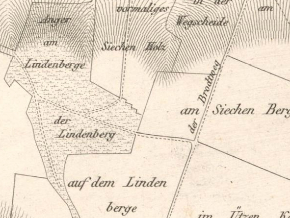 Die dem Braunschweiger Stadtteil namensgebende Erhebung "Lindenberg" auf einer Karte von 1835.